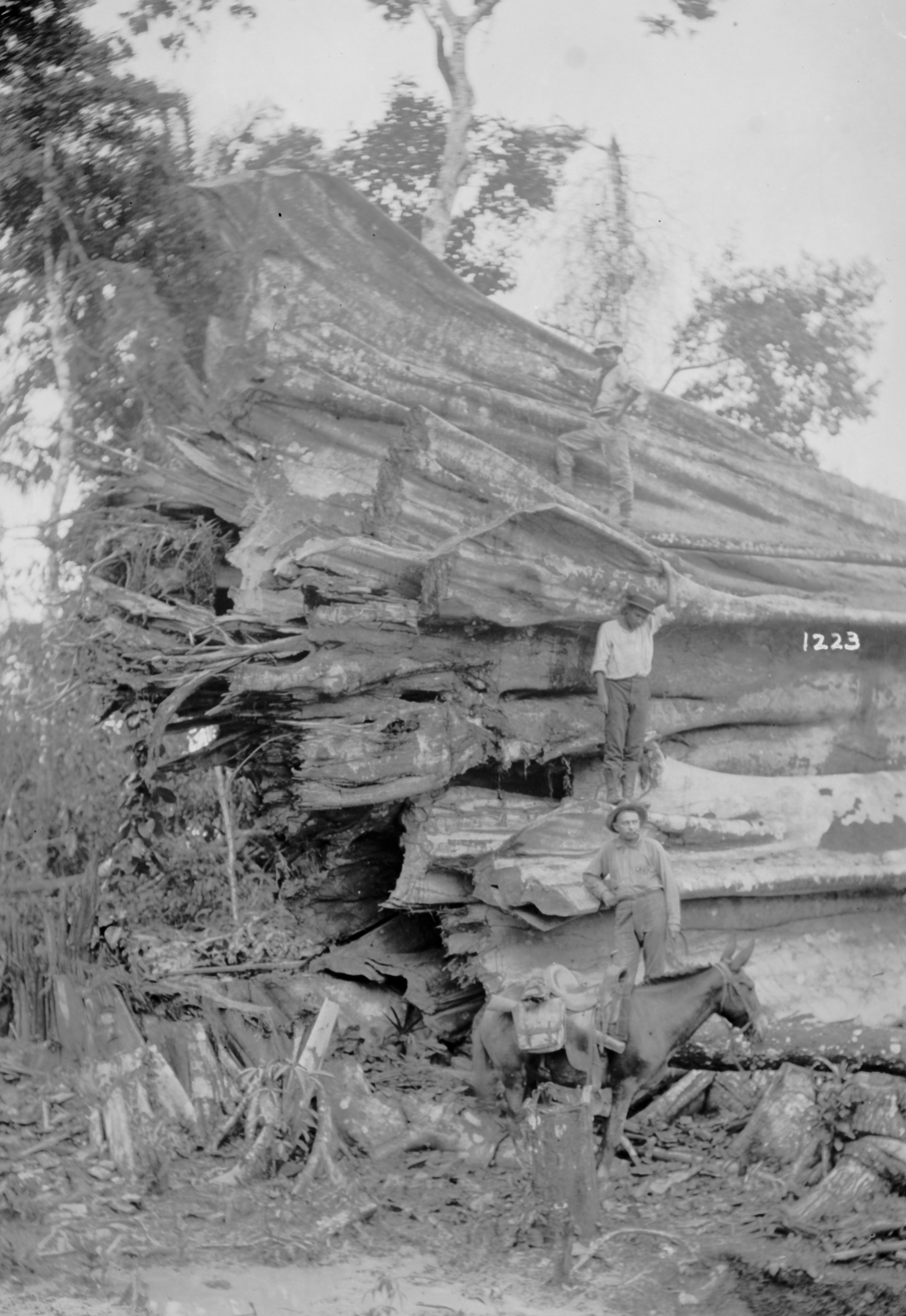 Obra que integra o acervo do Museu Paulista da USP. Coleção Dana Merrill.